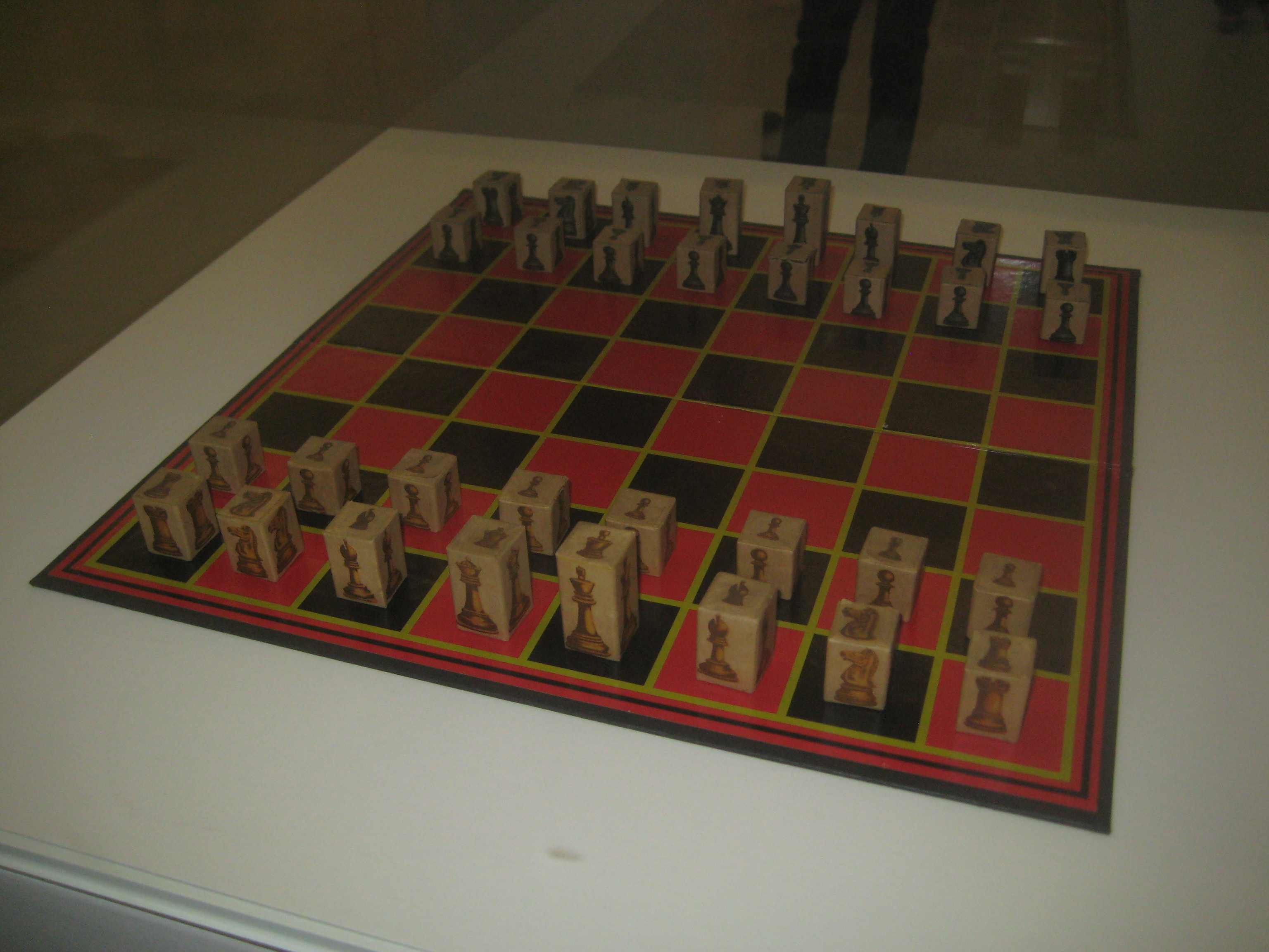 Шахматы. Ленинградские блокадные. Центральный дом шахматиста имени М.М. Ботвинника